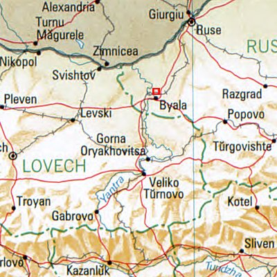 Borowo - Lage des Ortes in Bulgarien